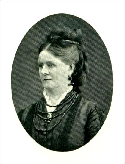 Junghuhns Gattin, geb. Johanna Louisa Frederica Koch